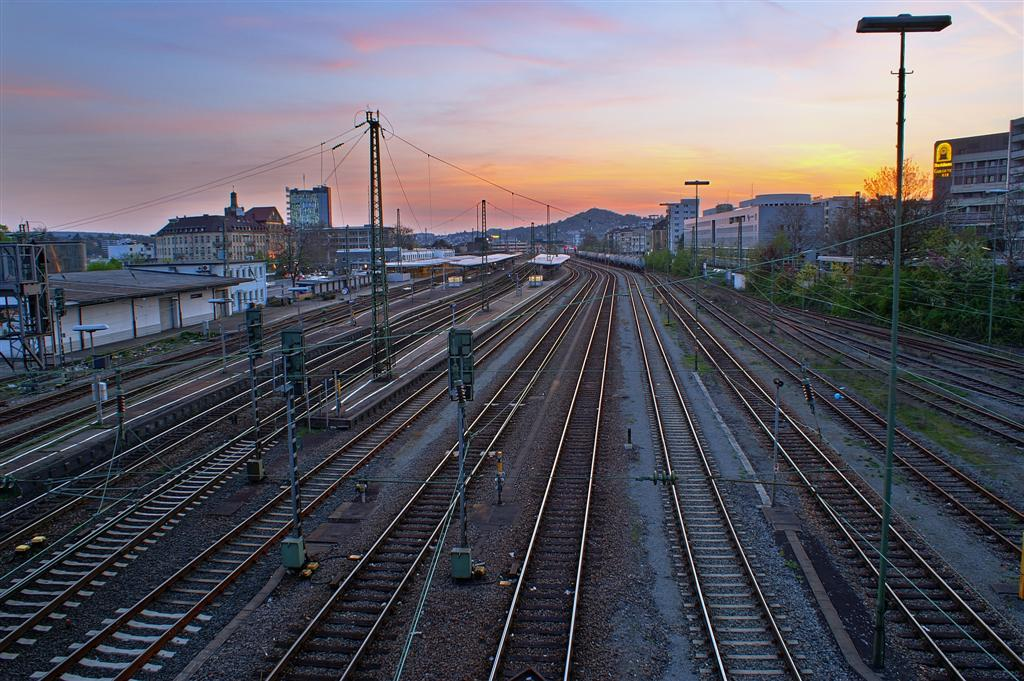 Pforzheim Hbf